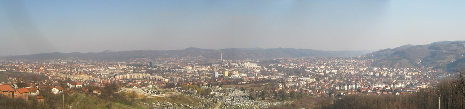 Panorama Banje Luke.